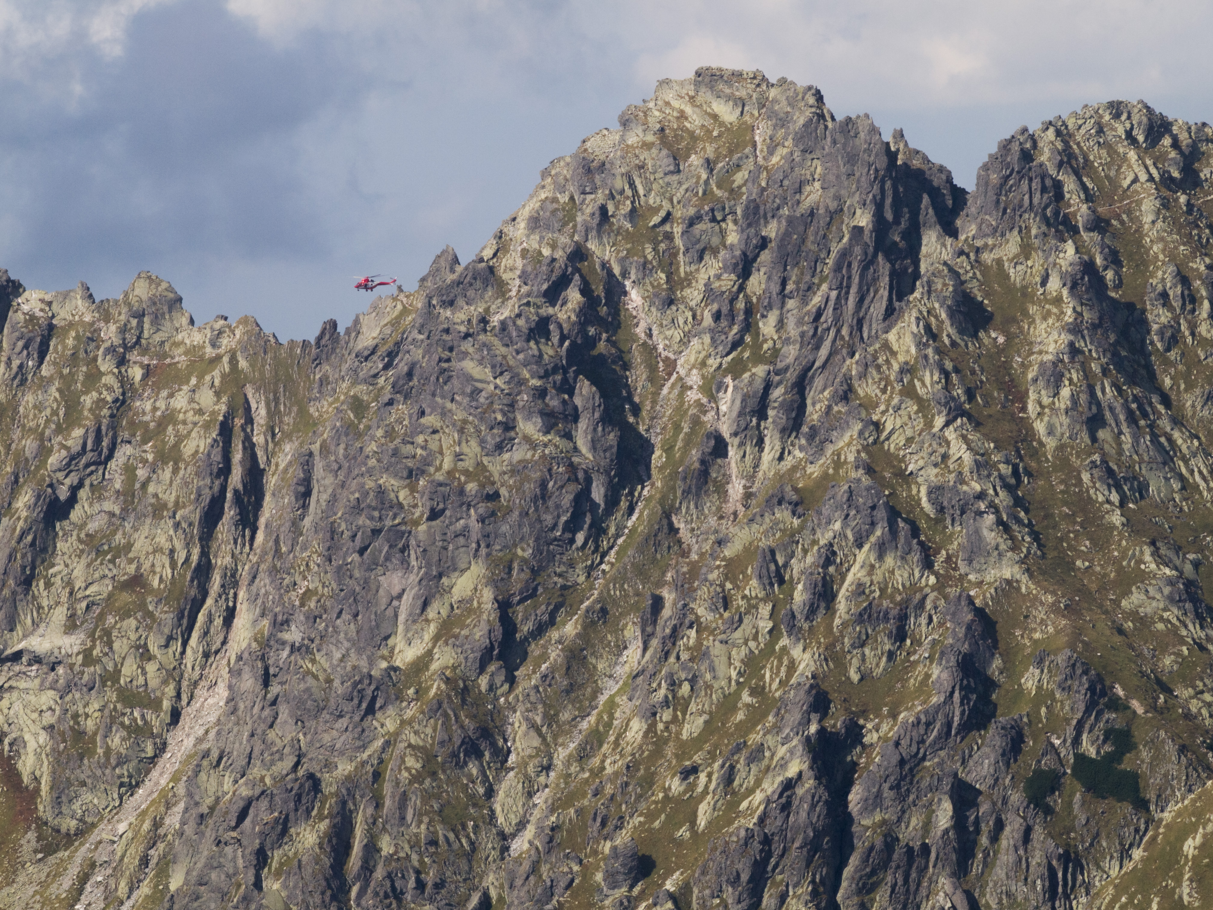 Od lewej: Buczynowe Czuby, Przełęcz Nowickiego, śmigłowiec TOPR, Budzowa Igła, Budzowa Przełączka, Wielka Buczynowa Turnia, Buczynowa Przełęcz, Mała Buczynowa Turnia (niższy, pd-zach. wierzchołek).